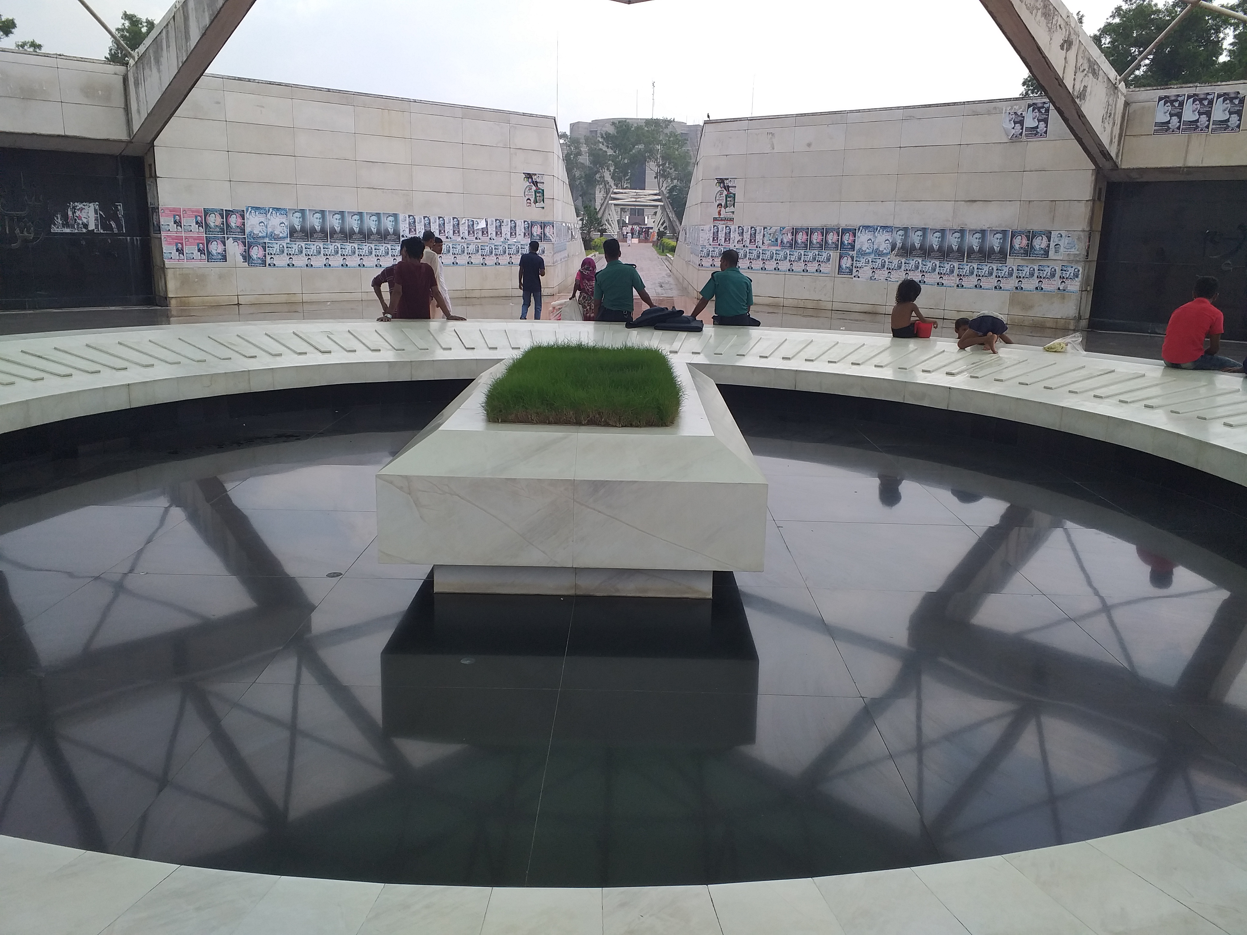 শহীদ রাষ্ট্রপতি জিয়াউর রহমানের সমাধি এখানে.